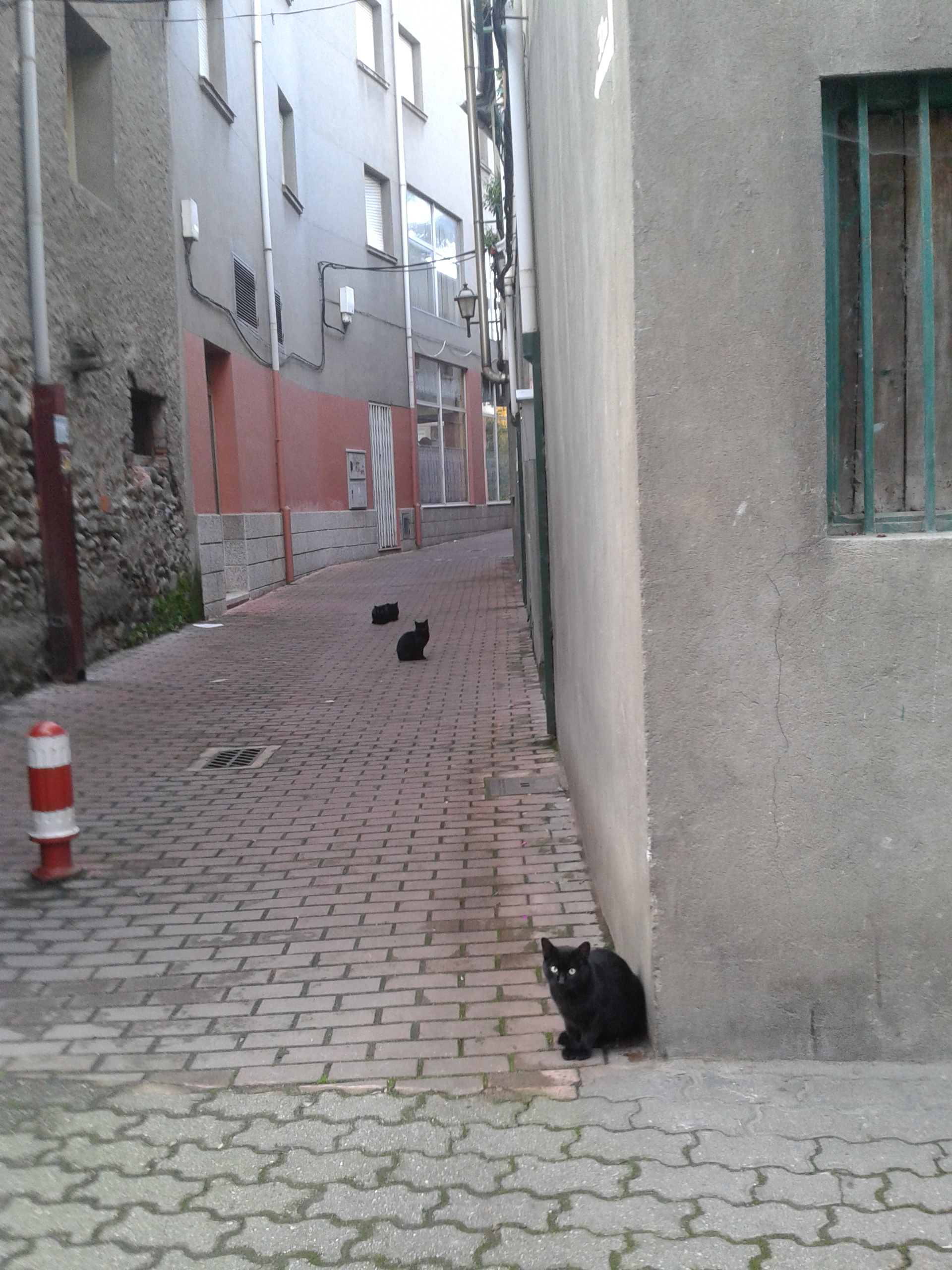 Gatos negros en Cacabelos, El Bierzo, Españas sobre el Camino a Santiago de Compostela